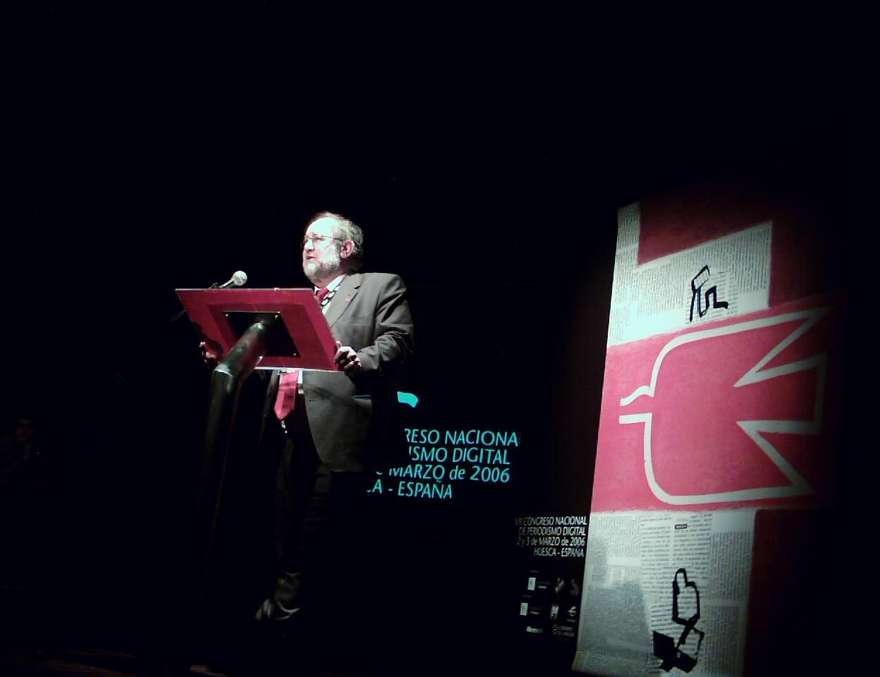 Provincia de Huesca, España.